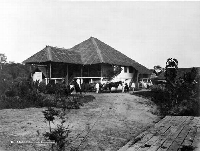 Foto. Woonhuis van de administrateur op de tabaksplantage Toempatan.